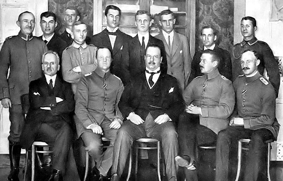 Description